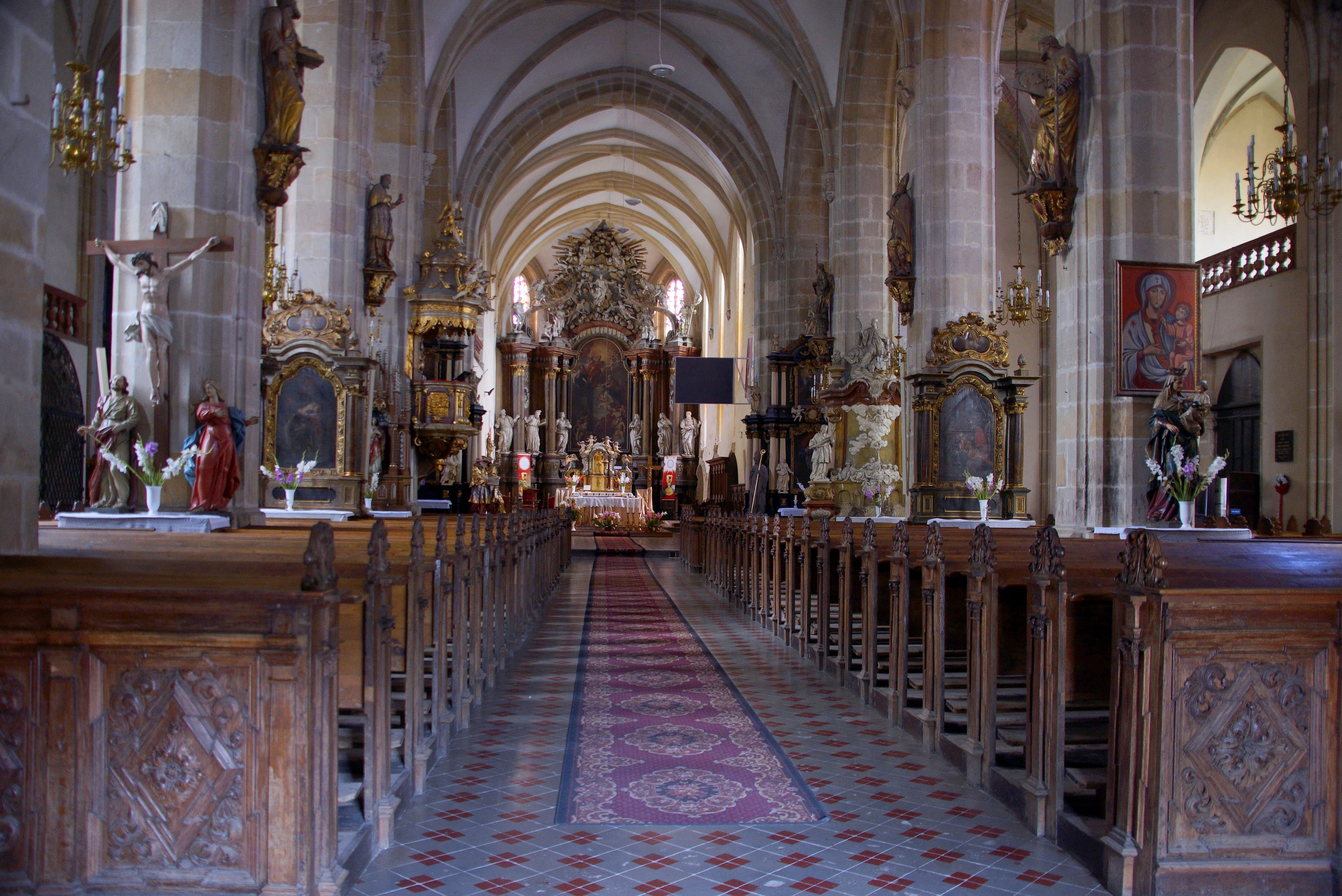 Jawor, pl. Kościelny - kościół parafialny p.w. św. Marcina, XIII-XIX, wnętrze (zabytek nr rejestr. A/1899/79)